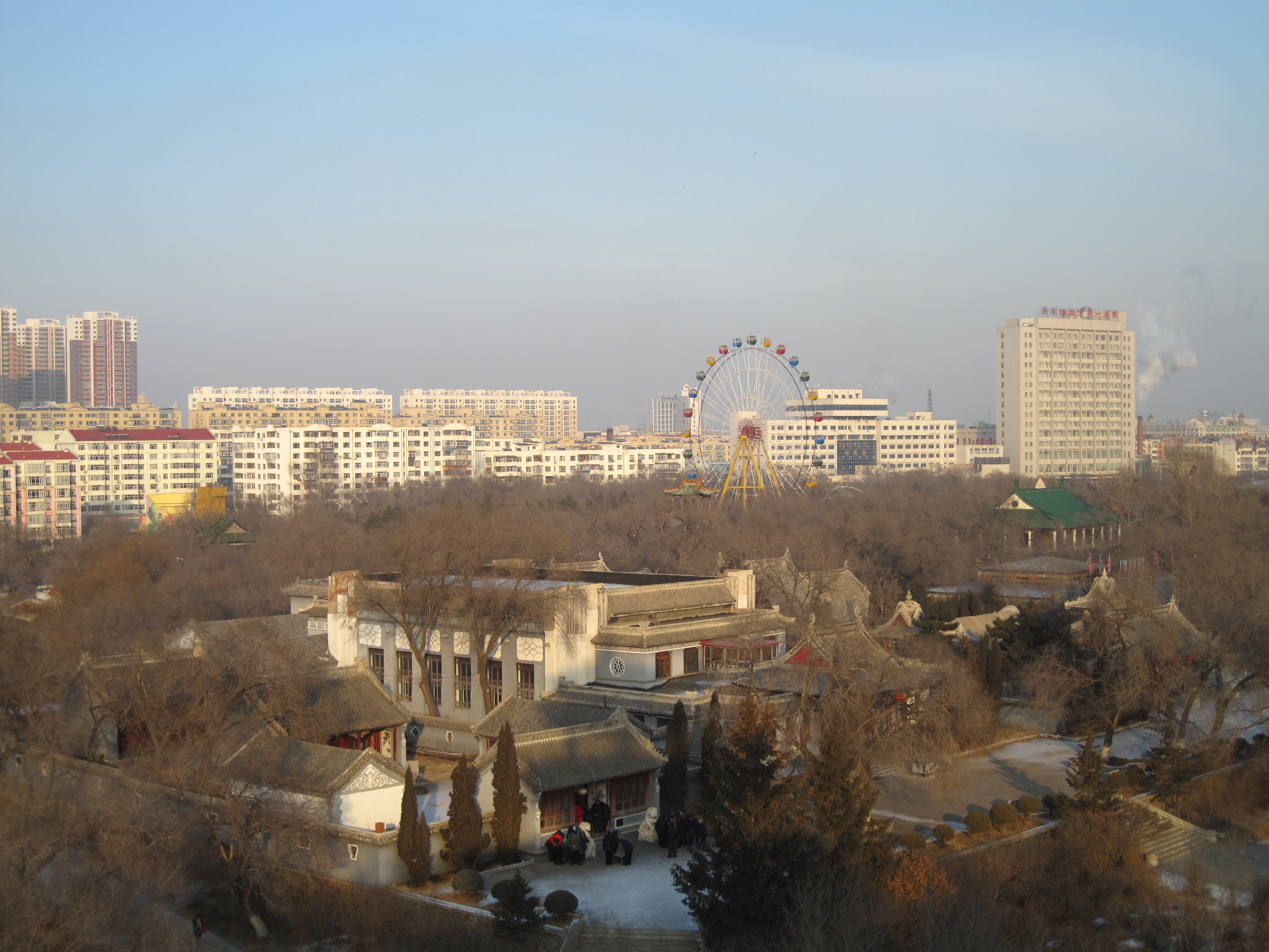 齐齐哈尔天际线，摄于龙沙公园。